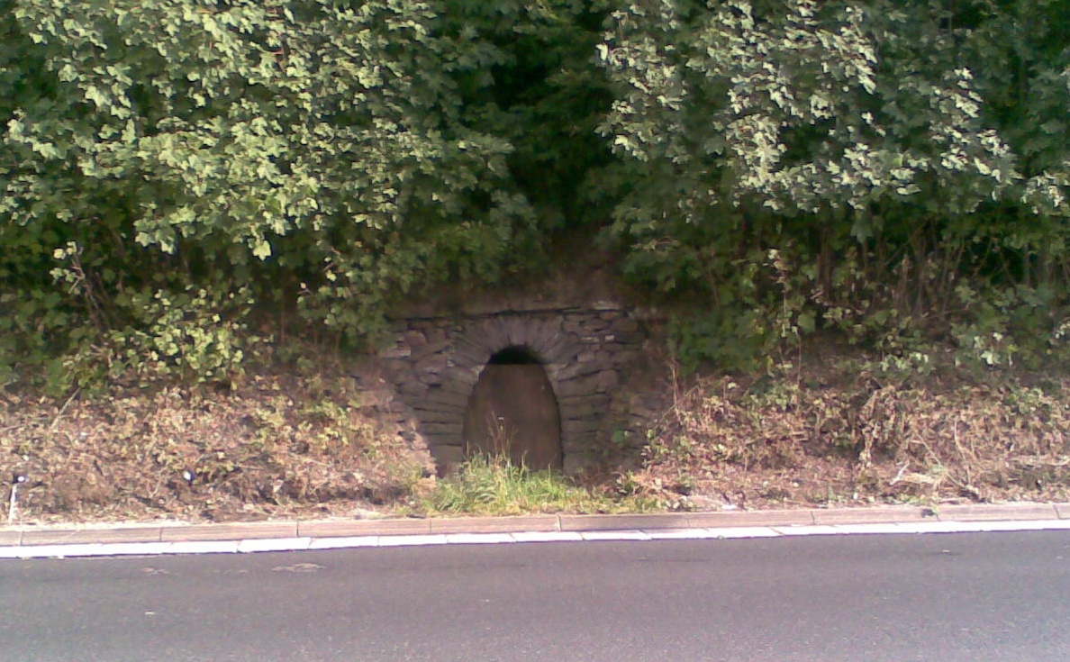 Das 2007 renovierte Mundloch der ehemaligen Kobaltgrube „Hasselstrauch“ in Siegen-Eiserfeld.